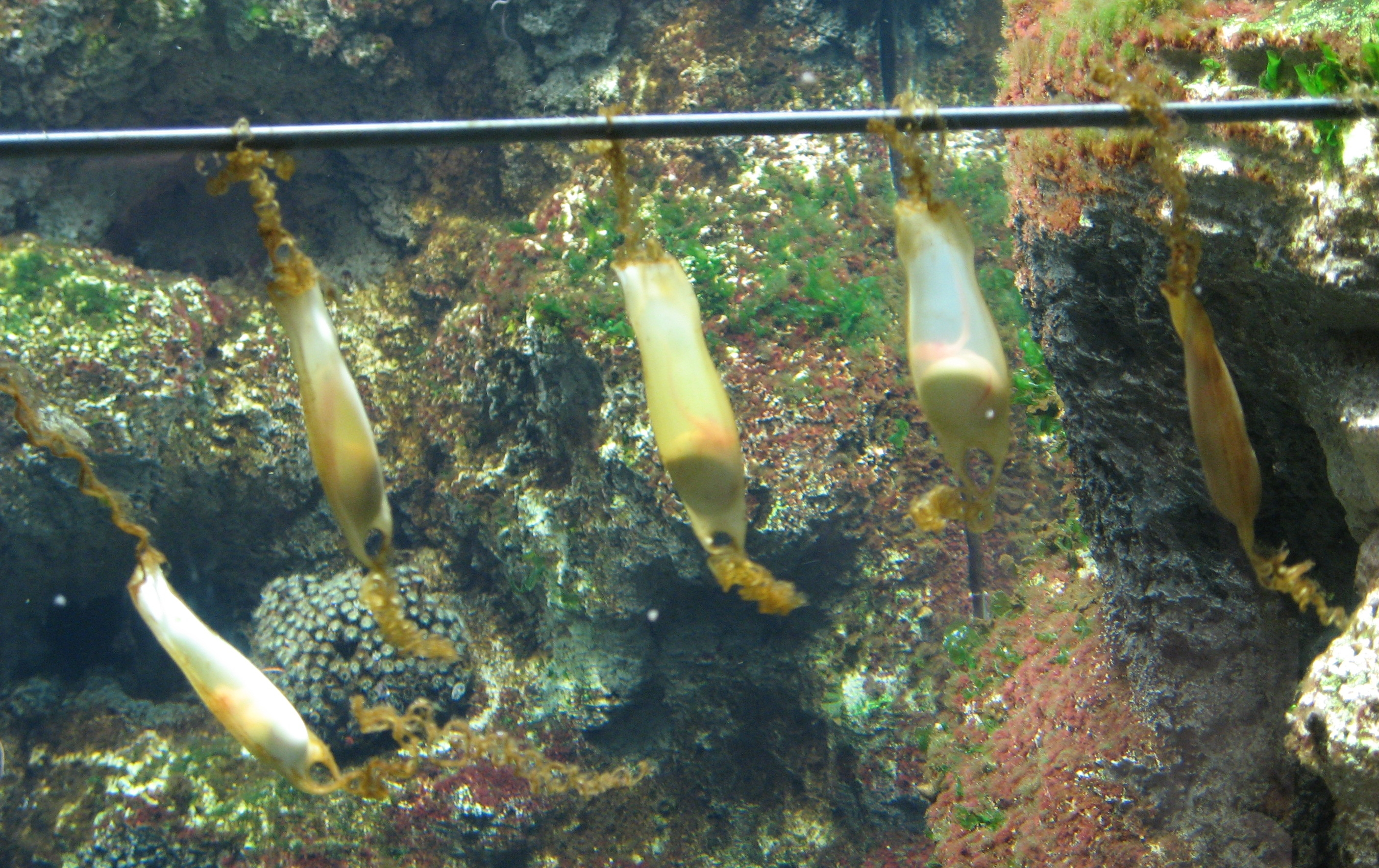 Scyliorhinus canicula eggs in Aquarium Cinéaqua Map: 48° 51' 44" N 2° 17' 27" E